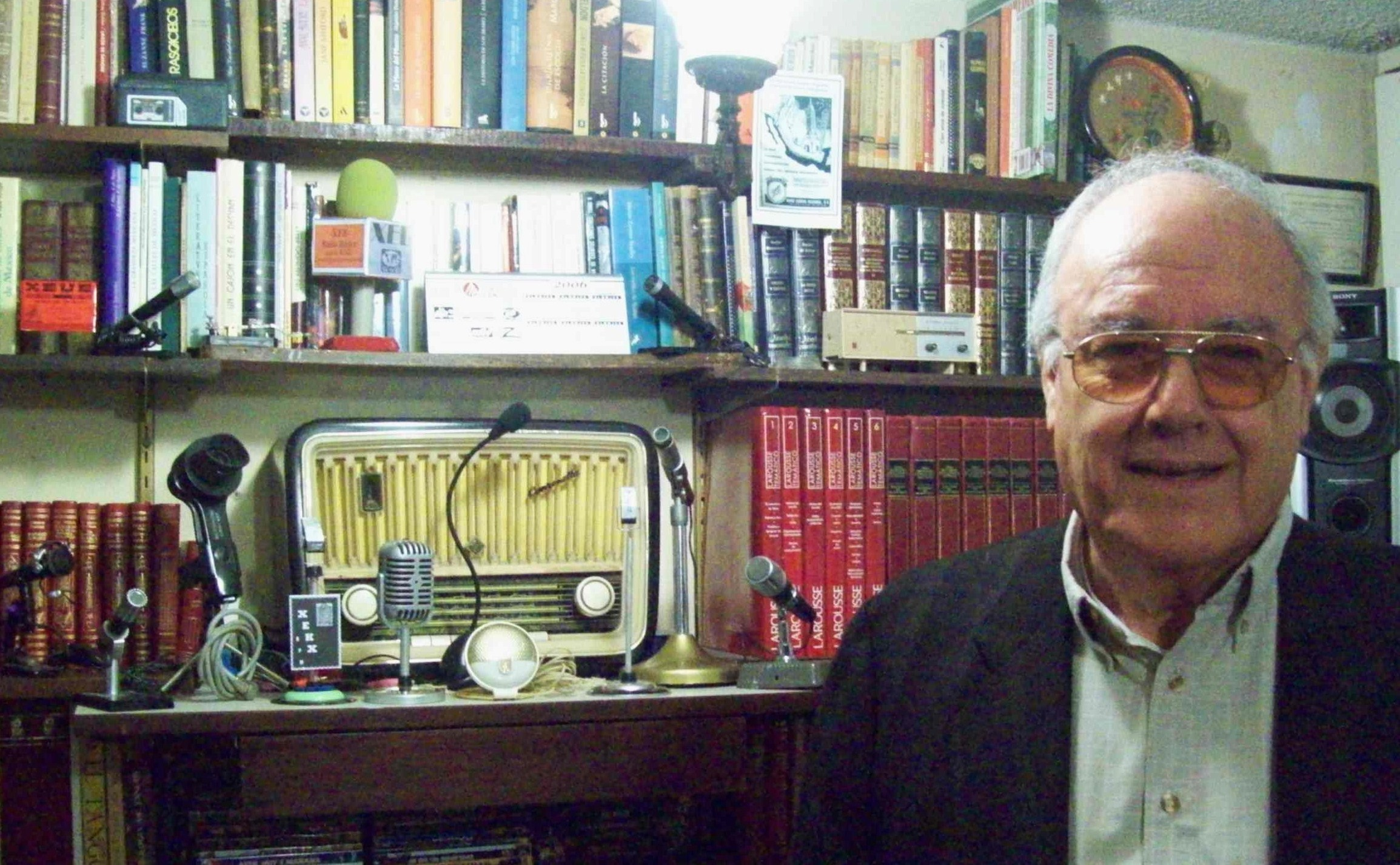 El locutor Carlos Fuentes Argüelles en la actualidad, rodeado de recuerdos de difusoras y motivos radiofónicos.